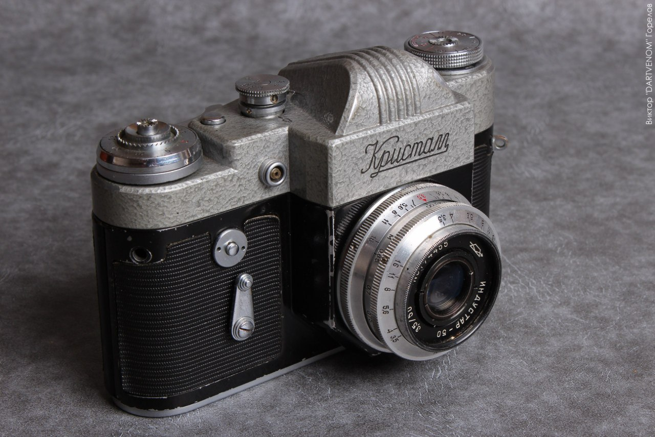 Фотокамера "Кристалл"